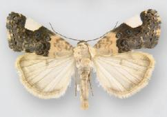 Acontia areloides male